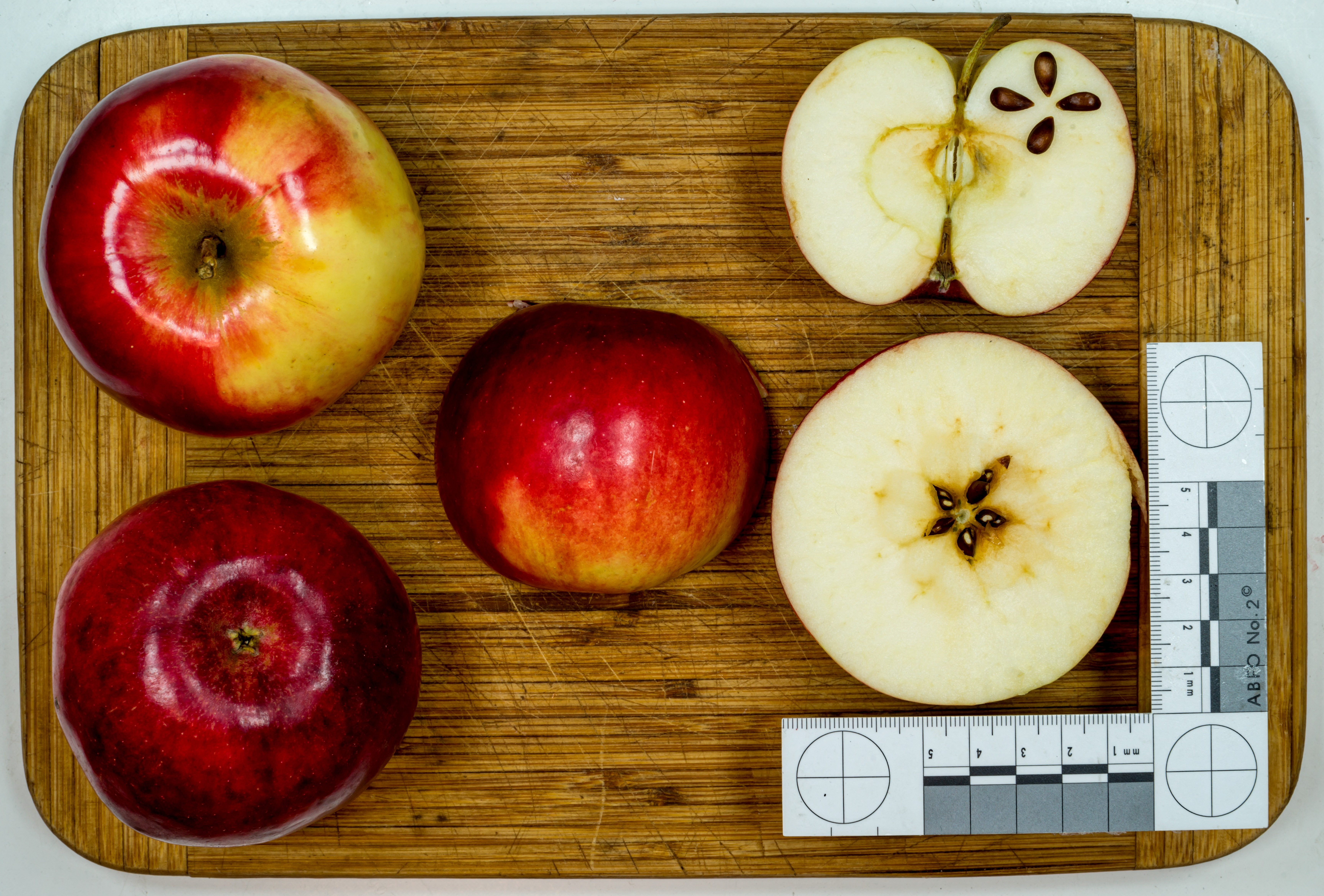 Apfelsorte:Idared